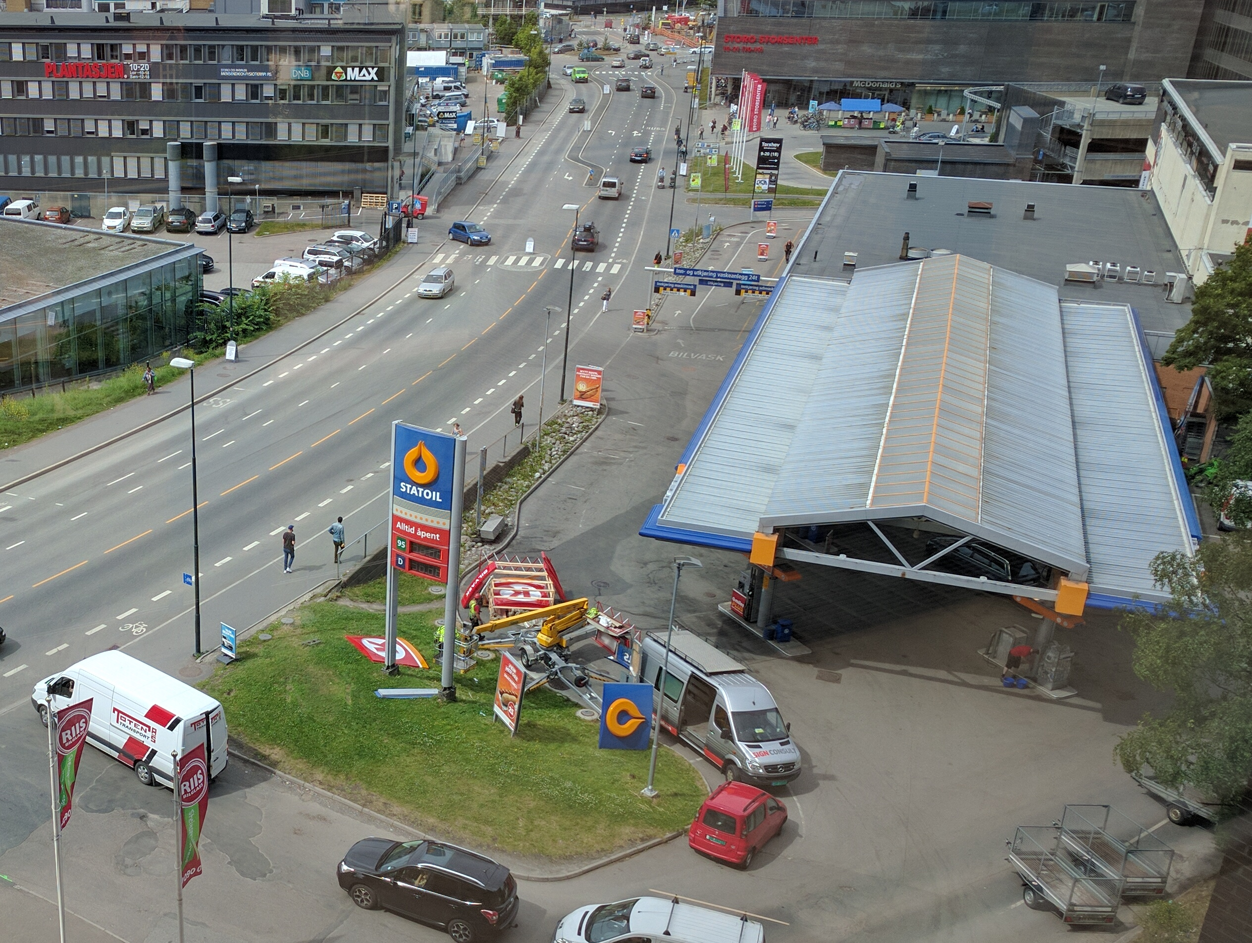 Omprofilering av Statoil-stasjonen på Storo til Cirkle-K